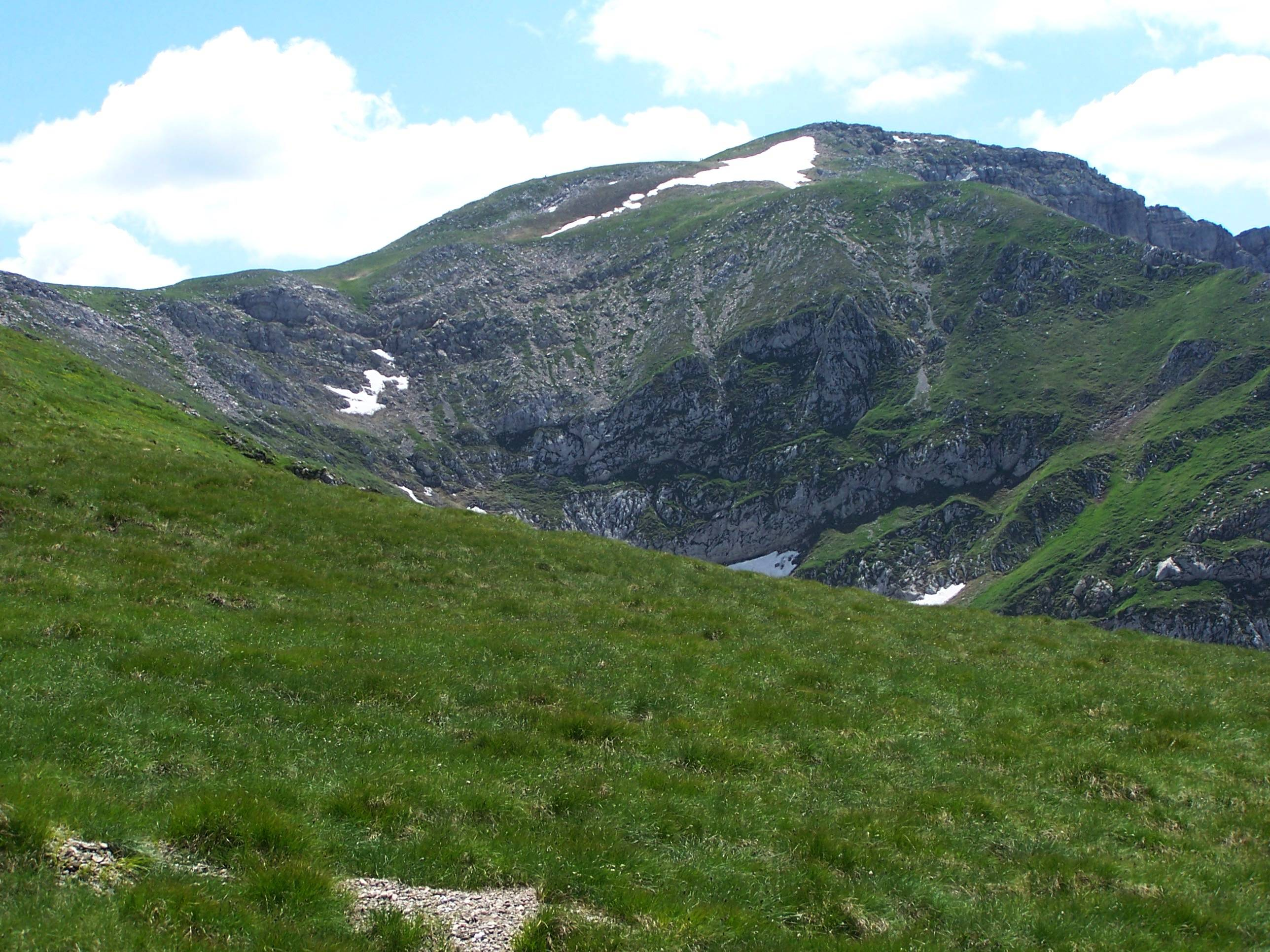 Krzesanica (Tatra Mountains, Czerwone Wierchy)